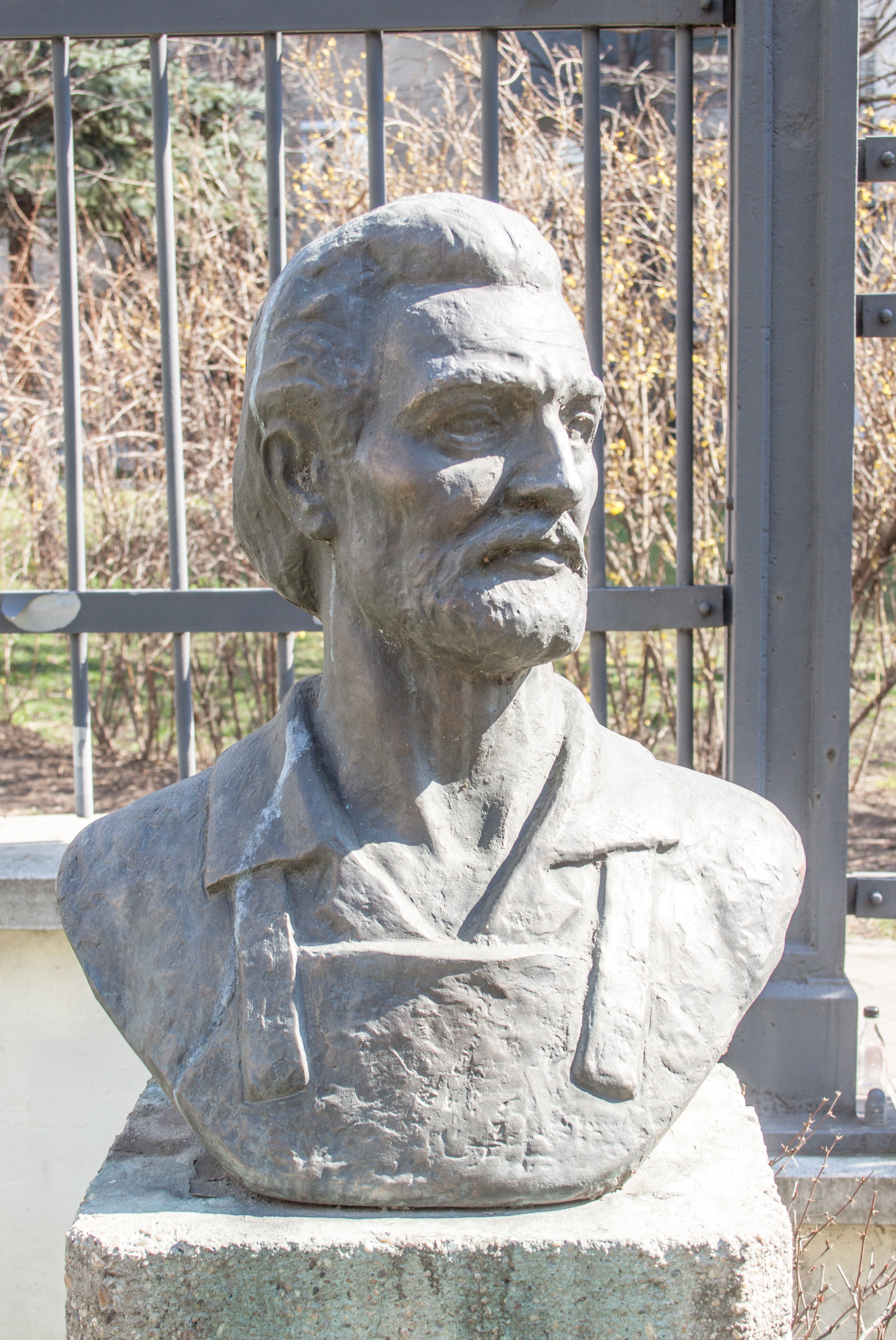 Bust of Henrik Fazola